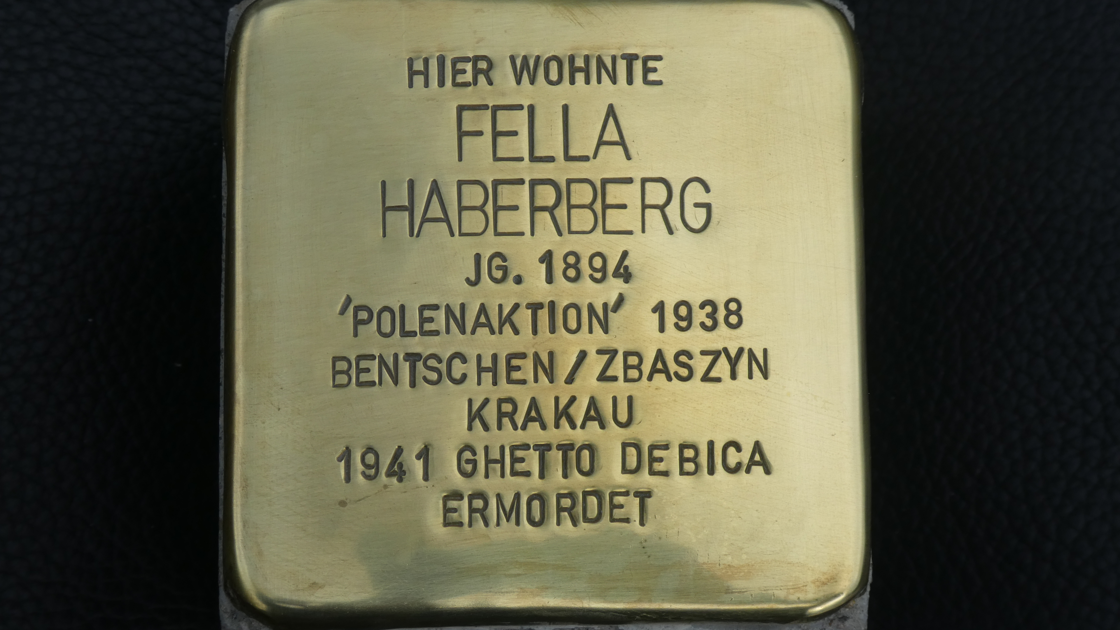 Fella Haberberg, 2018 Lünen-Brambauer